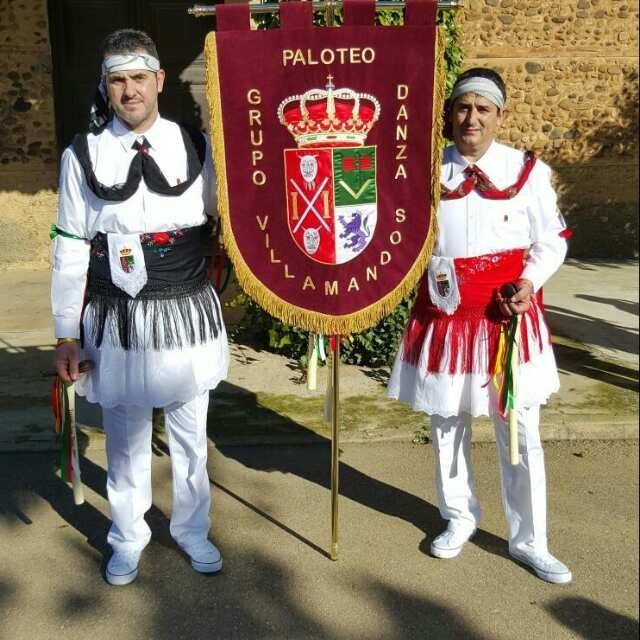 Estandarte con danzantes del grupo del paloteo de Villamandos